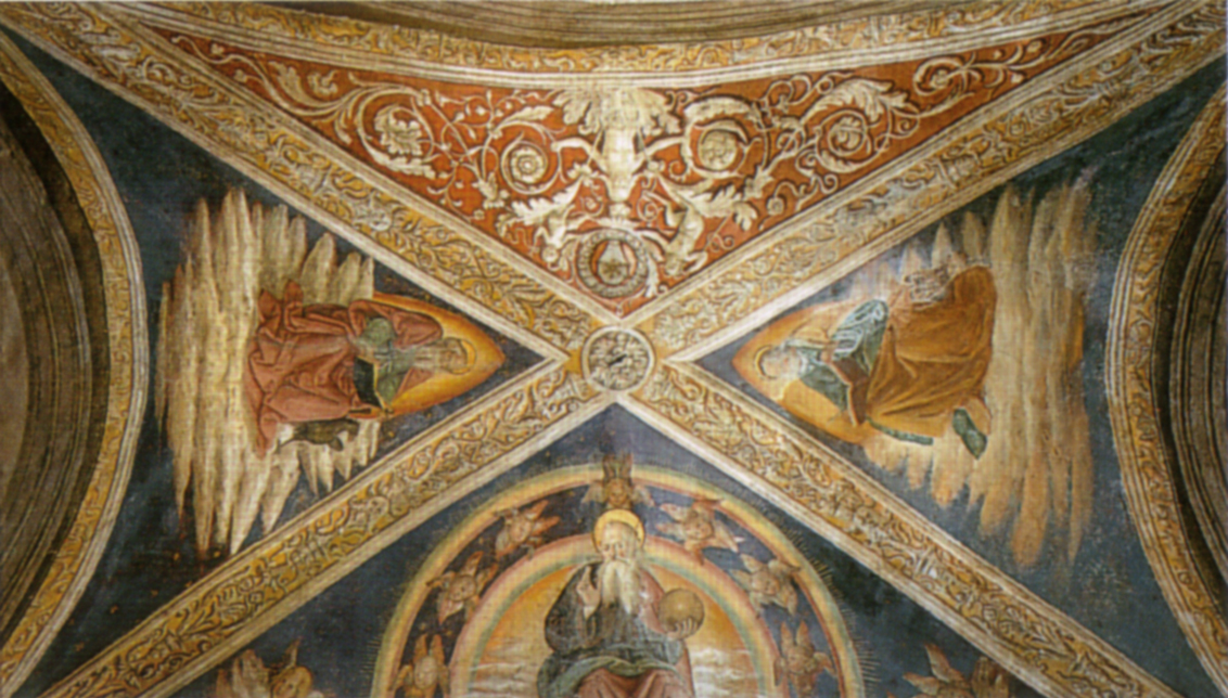 Pinturicchio, volta della cappella ponziani in santa cecilia in trastevere, 1485-1490 ca.